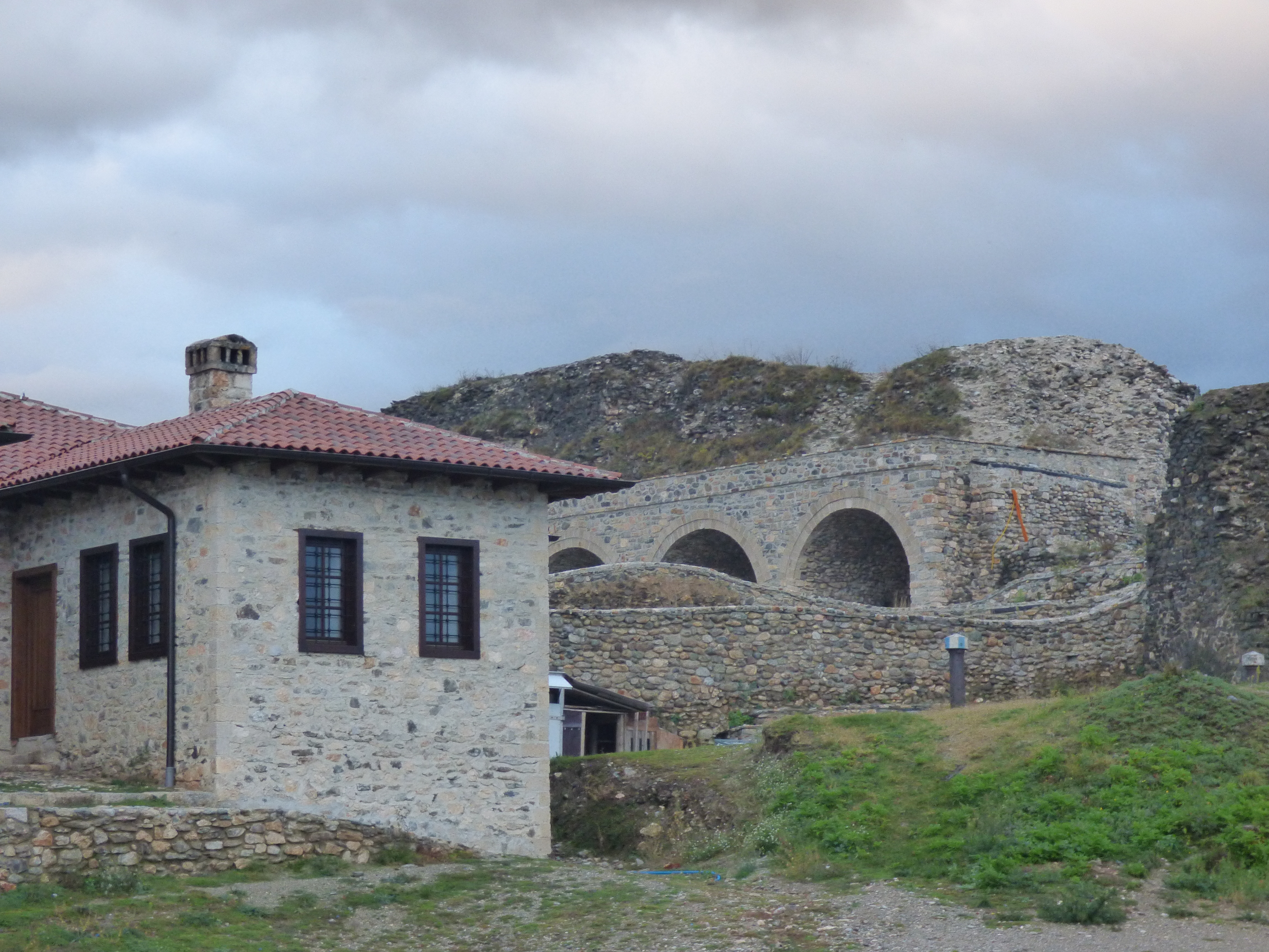 Festung von Prizren (2016)